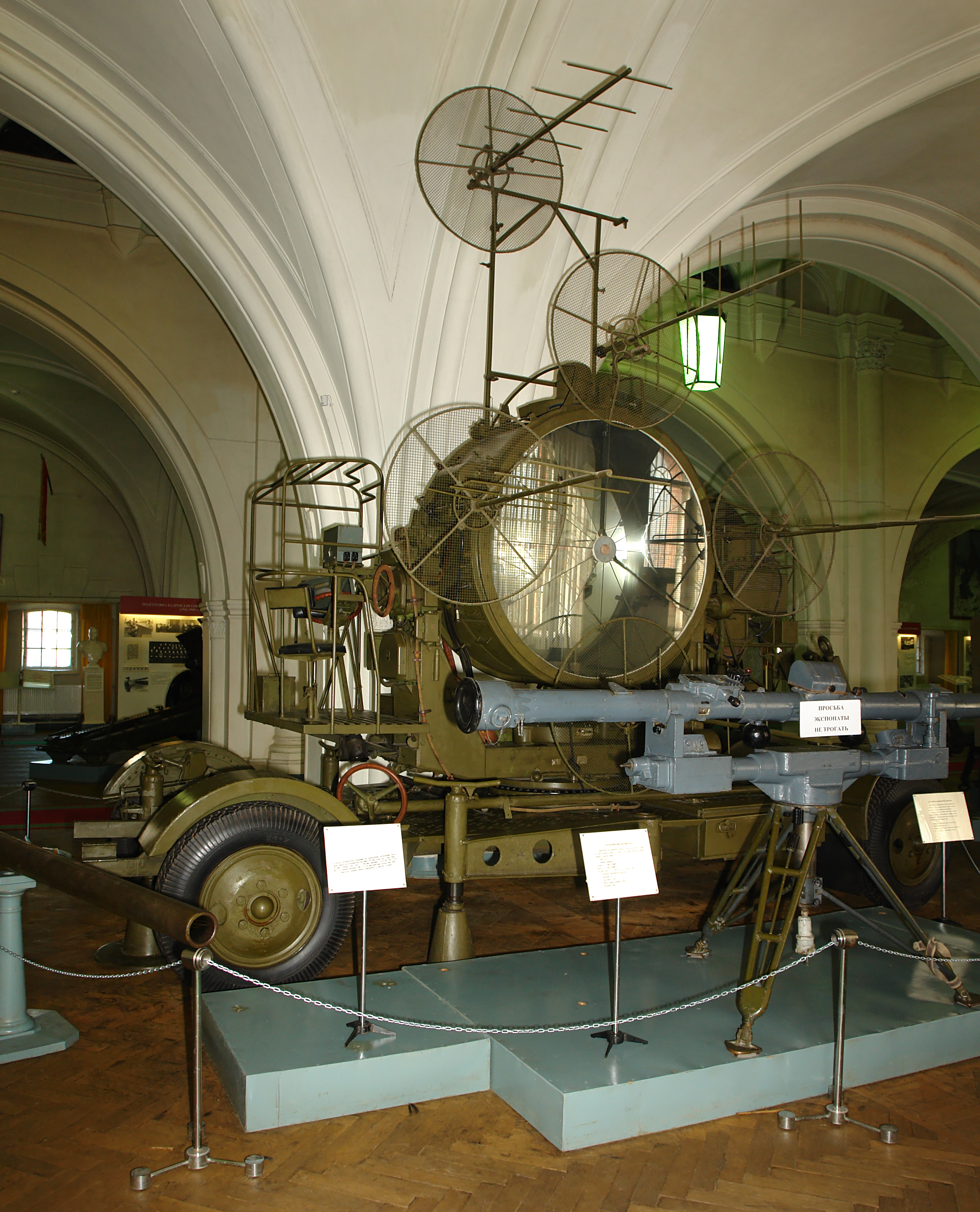 150 см зенитная радиопржекторная станция РП-15-1 Предназначена для обнаружения воздушных целей и определения наклонной дальности до них, точного наведения прожектора по азимуту и углу места на обнаруженную цель, для ее освещения лучом прожектора ночью. Станция представляет собой зенитный прожектор ЗП-15-2, на котором смонтированы радиолокатор и система дистанционного управления с выносным постом управления. В состав станции входит также агрегат питания на автомашине ЗИС-151, одновременно являющейся тягачом. Дальность обнаружения воздушных целей — не менее 28—30 км. Дальность пеленга — не менее 25 км. Минимальная дальность обнаружения и пеленга воздушных целей — 1 км. Масса радиопрожектора (с повозкой ЗУ-13п) — около 5070 кг. Военно-исторический музей артиллерии, инженерных войск и войск связи, Санкт-Петербруг.